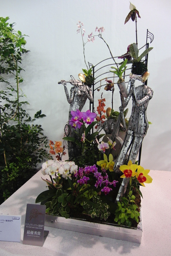 JGP2012【部門6】最優秀賞 「夢のつづき」 2012/02/26東京ドームにて撮影